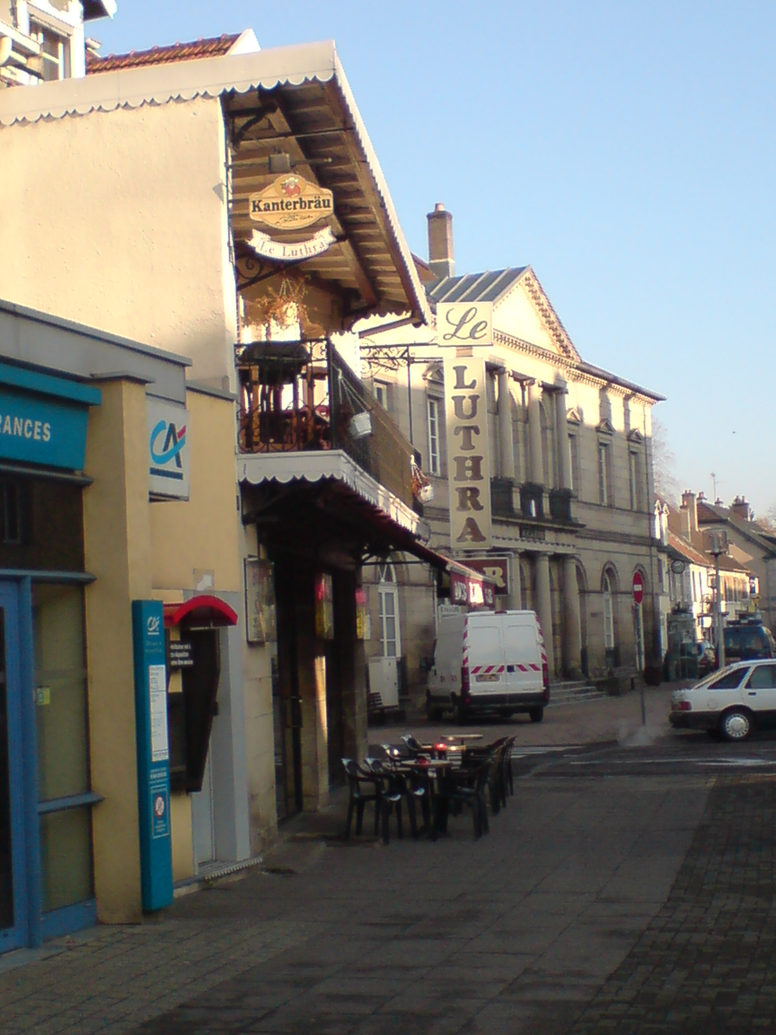 Bar très fréquenté ; Lure, Haute-Saône